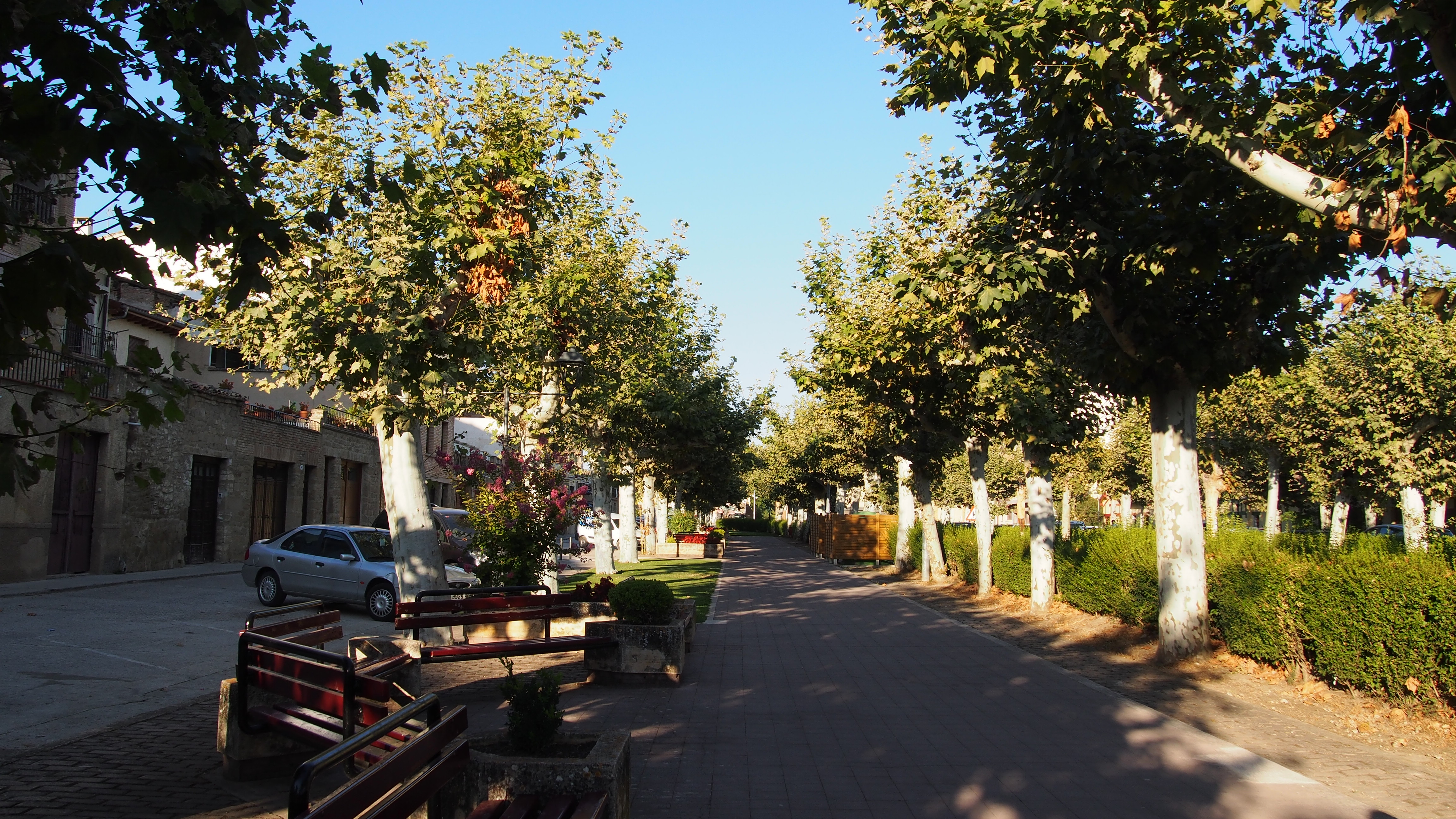 Foruen pasealekua Garesen